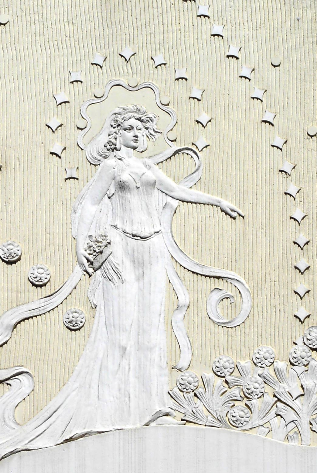 Steinbruecke 11 in Quedlinburg (Germany)